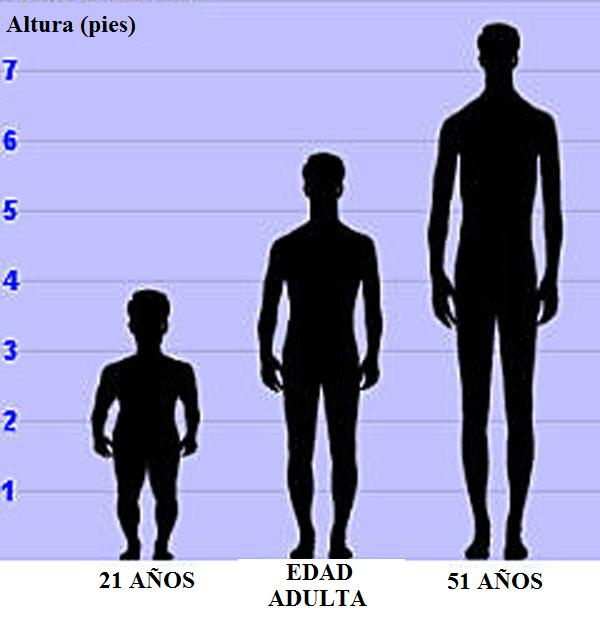 Etapas de crecimento de Adam Rainer. Alternancia de enanismo y acromegalia